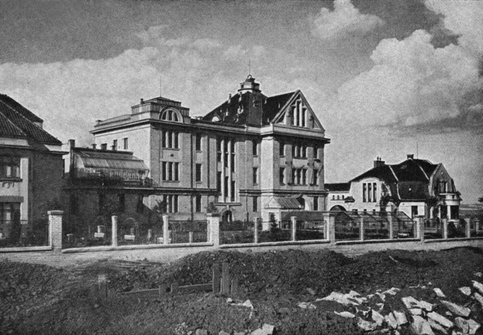 Areál Výzkumného ústavu cukrovarnického Střešovice. Obr. 1 Pohled na cukrovamický ústav od jihozápadu.